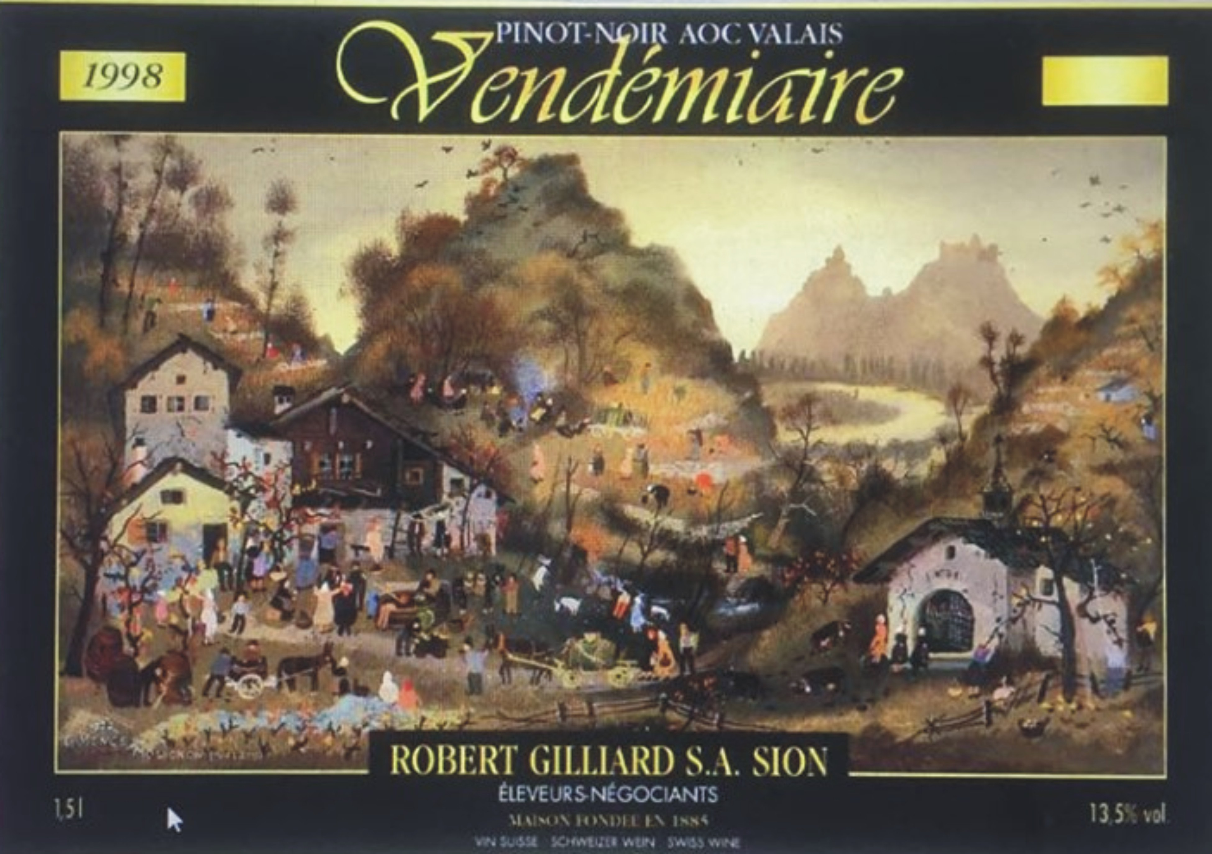 Vendanges à Molignon